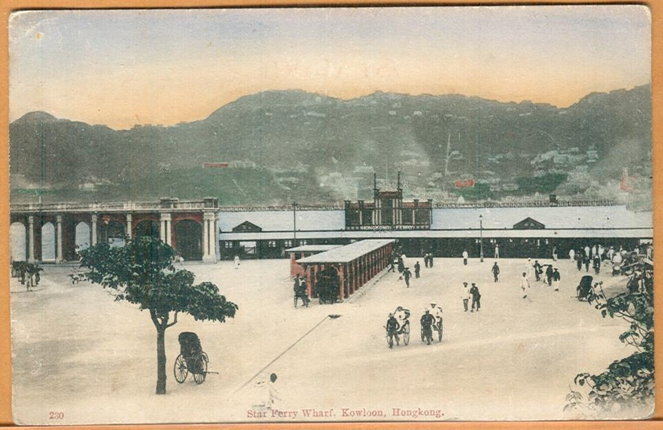 香港之風景